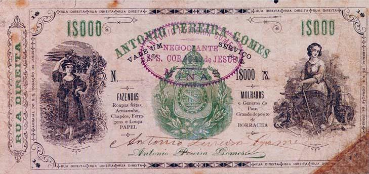 Vale de 1 mil réis. Obra ROUBADA do Museu Paulista (ou do Ipiranga), São Paulo, Brasil.